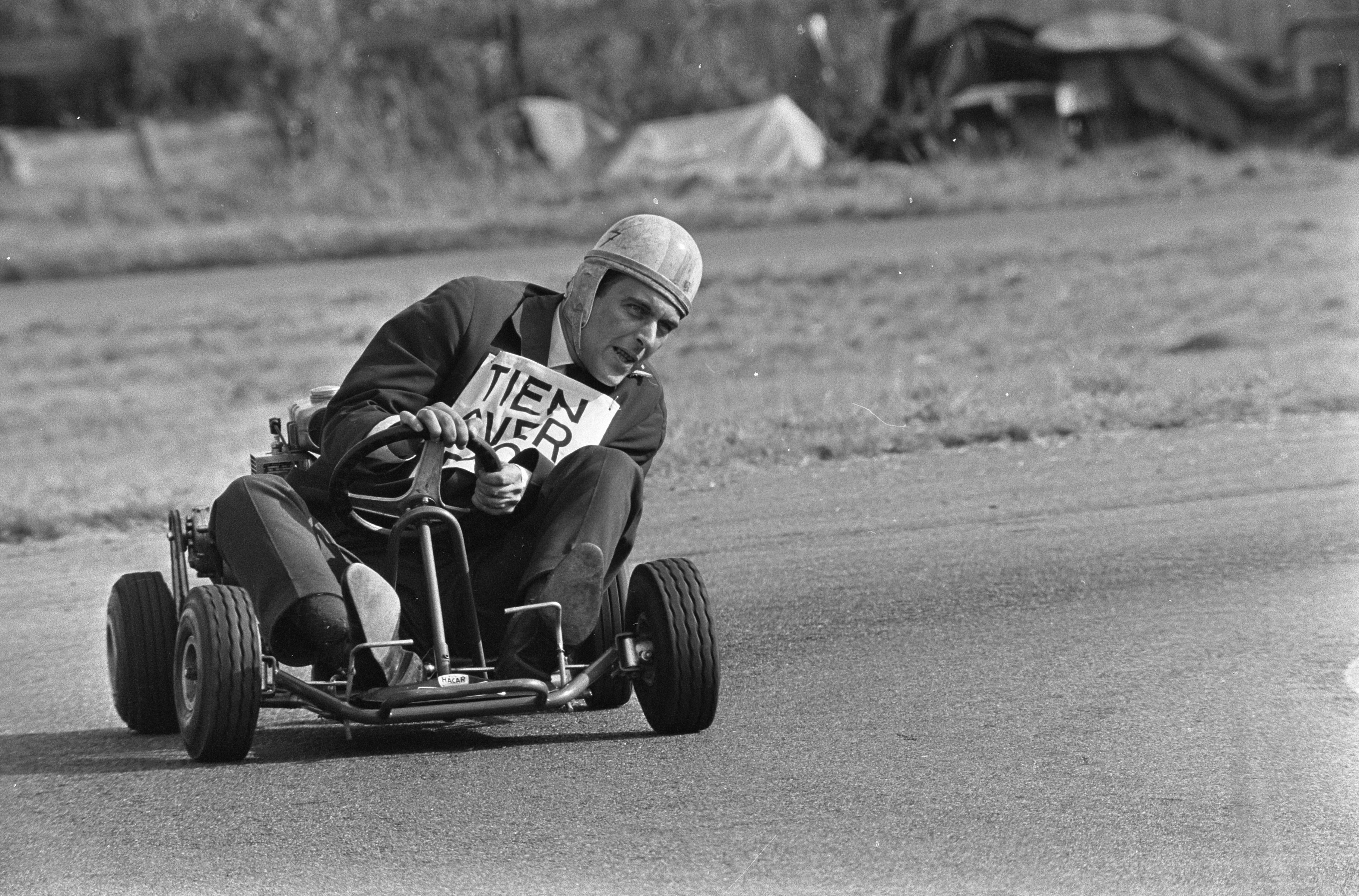 Collectie / Archief : Fotocollectie Anefo Reportage / Serie : [ onbekend ] Beschrijving : Cartingwedstrijd voor politici op Driebergen. Han Lammers van "Tien over Rood" werd winnaar van de wedstrijd Datum : 8 september 1967 Locatie : Driebergen Trefwoorden : Carting, POLITICI, Winnaars, wedstrijden Persoonsnaam : Lammers, Han Fotograaf : Kroon, Ron / Anefo Auteursrechthebbende : Nationaal Archief Materiaalsoort : Negatief (zwart/wit) Nummer archiefinventaris : bekijk toegang 2.24.01.05 Bestanddeelnummer : 920-6837